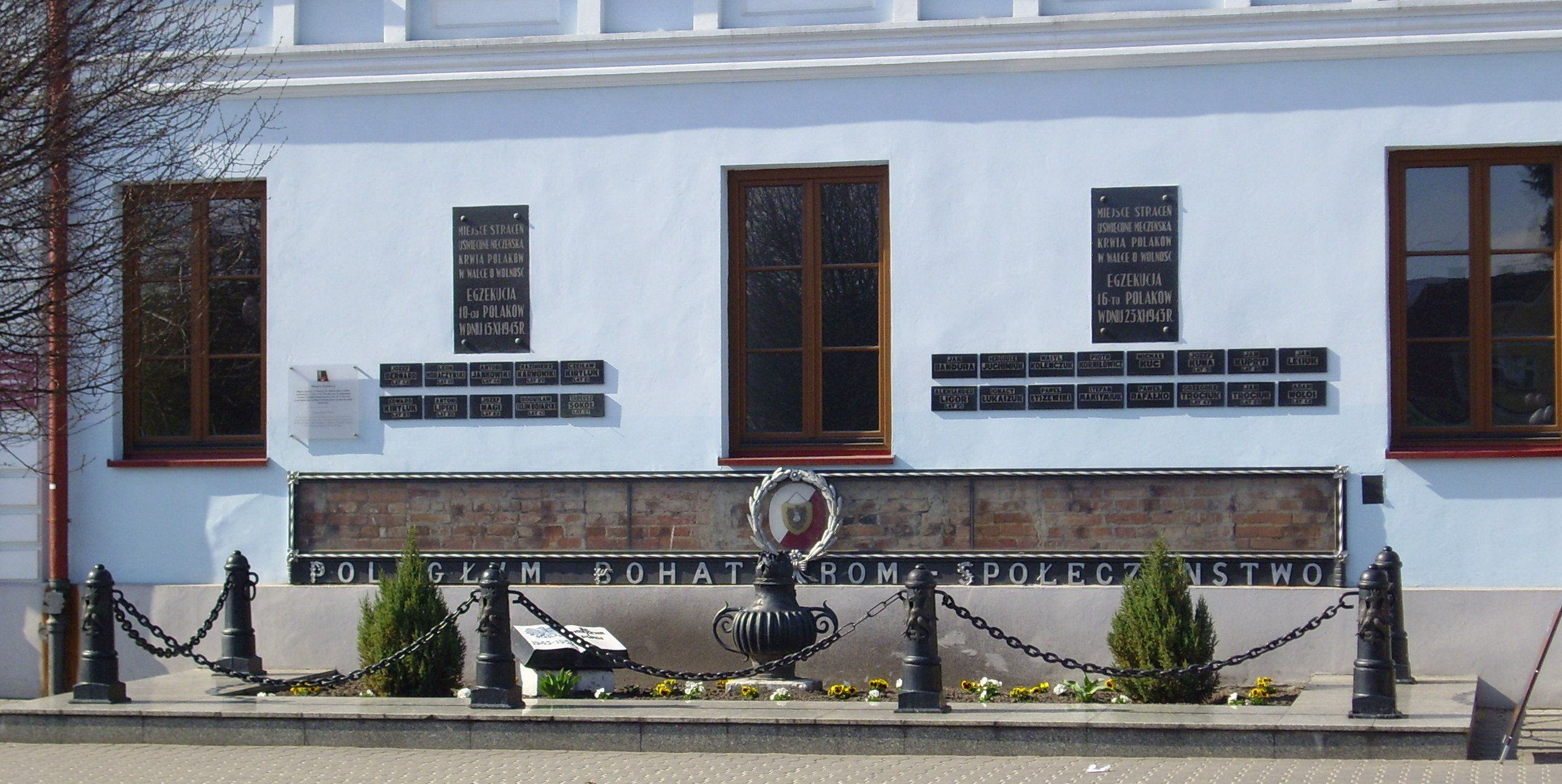 Biała Podlaska, pl. Wolności (Rynek). Pomnik – miejsce straceń Polaków z roku 1943.